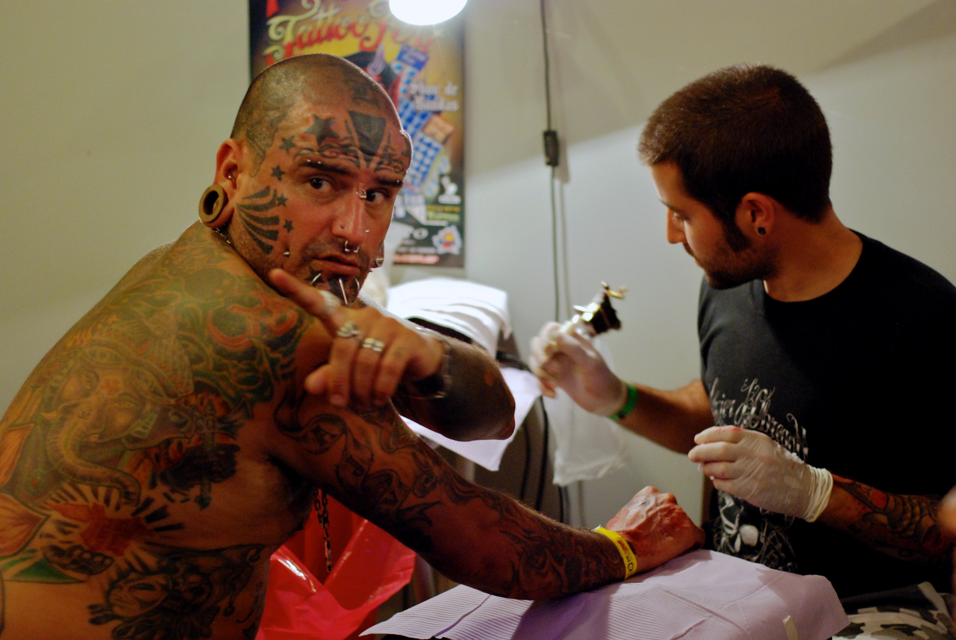 Getting a tattoo